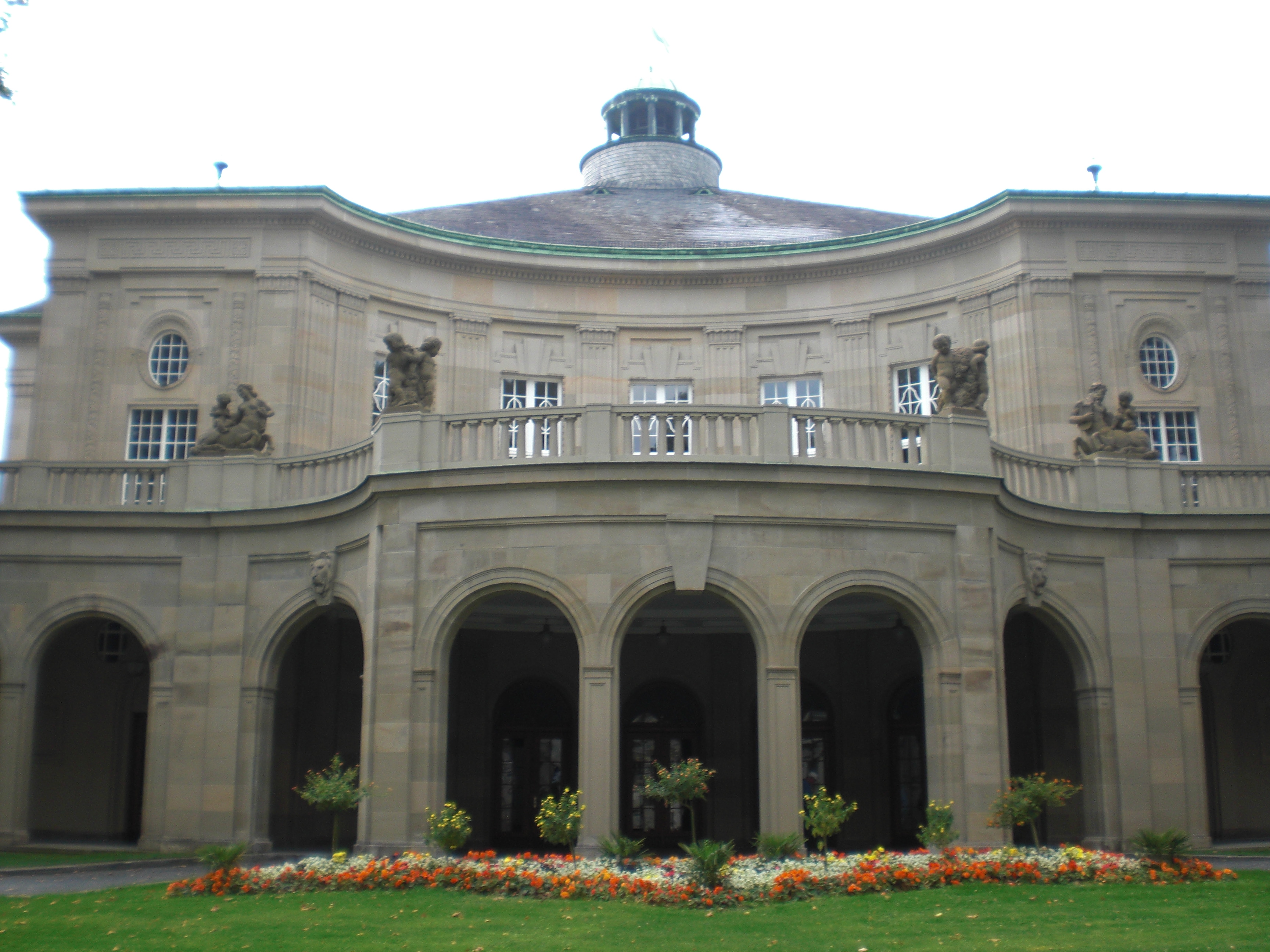 Regentenbau